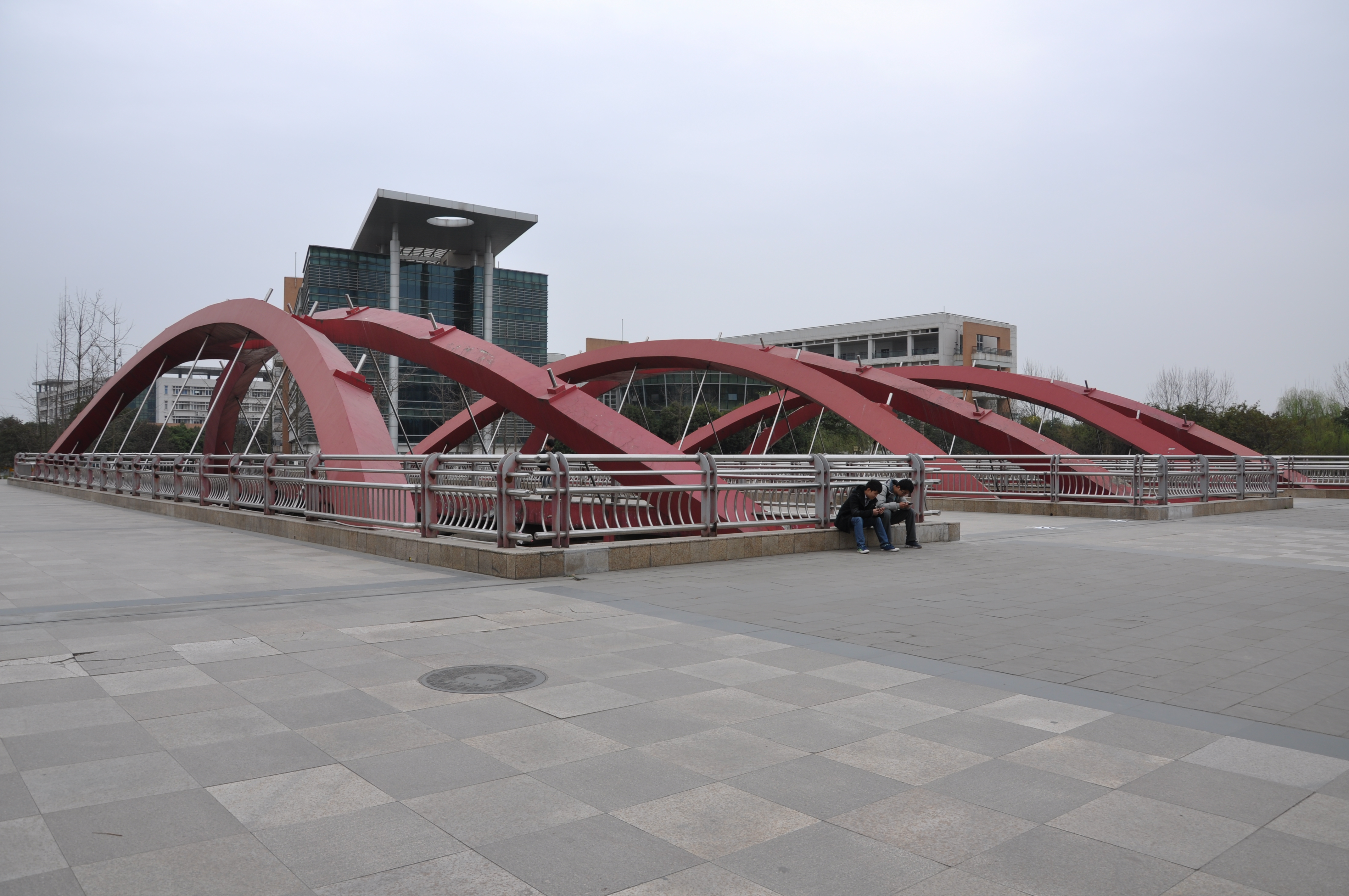 西南交大2014-03